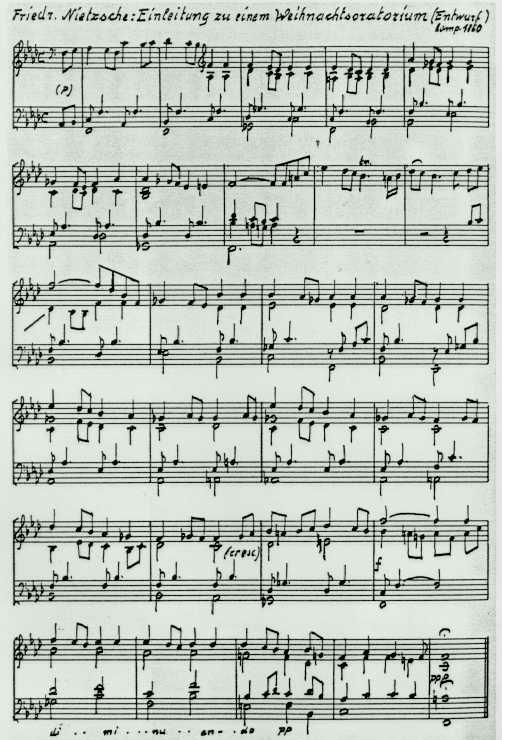 Oratorio de 1860 du philosophe Friedrich Nietzsche